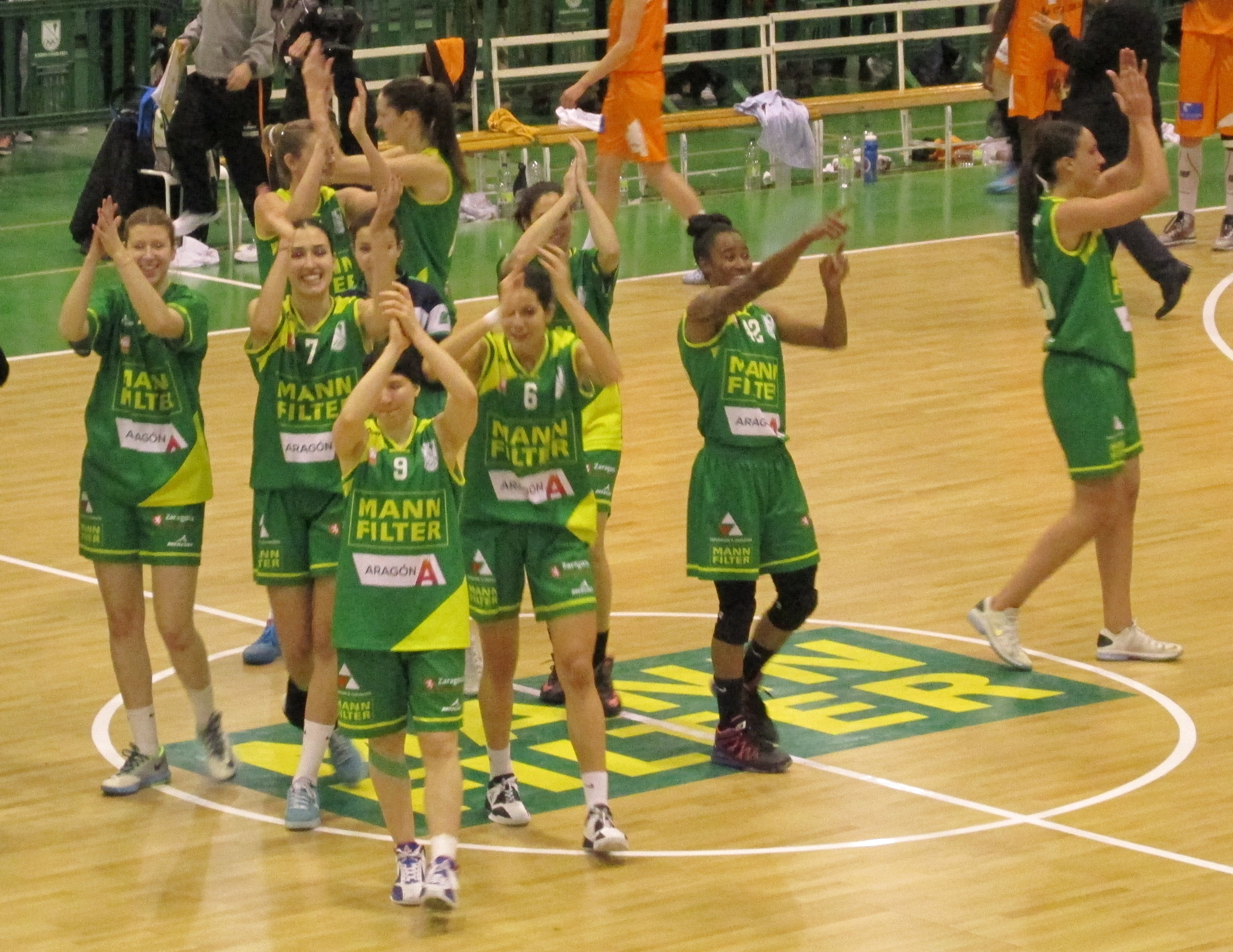 Stadium Casablanca Mann Filter 2014-15 Baloncesto